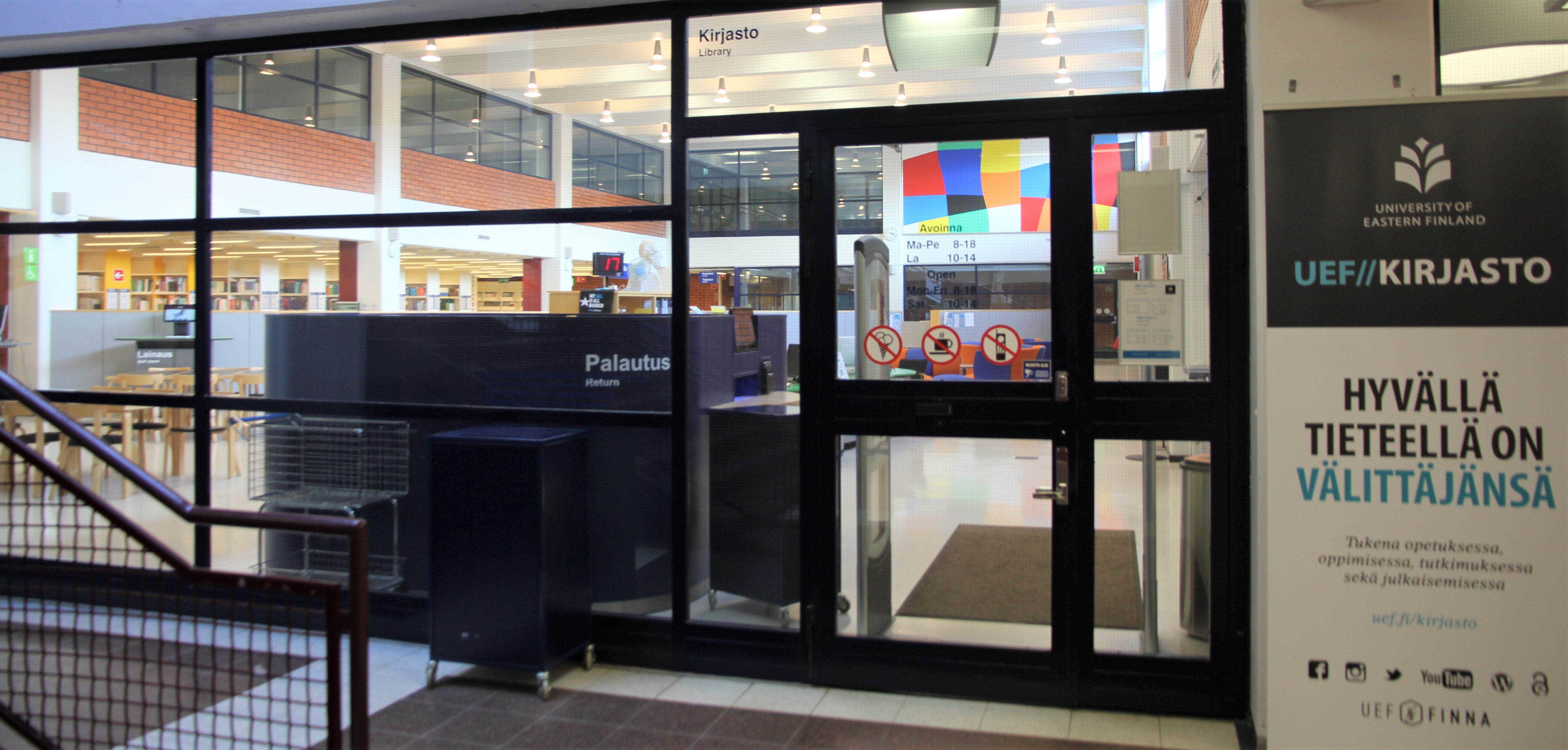 Itä-Suomen yliopiston kirjaston Kuopion kampuskirjaston sisäänkäynti Snellmaniassa (Yliopistonranta 1 E) Kuopion Savilahden kaupunginosassa.